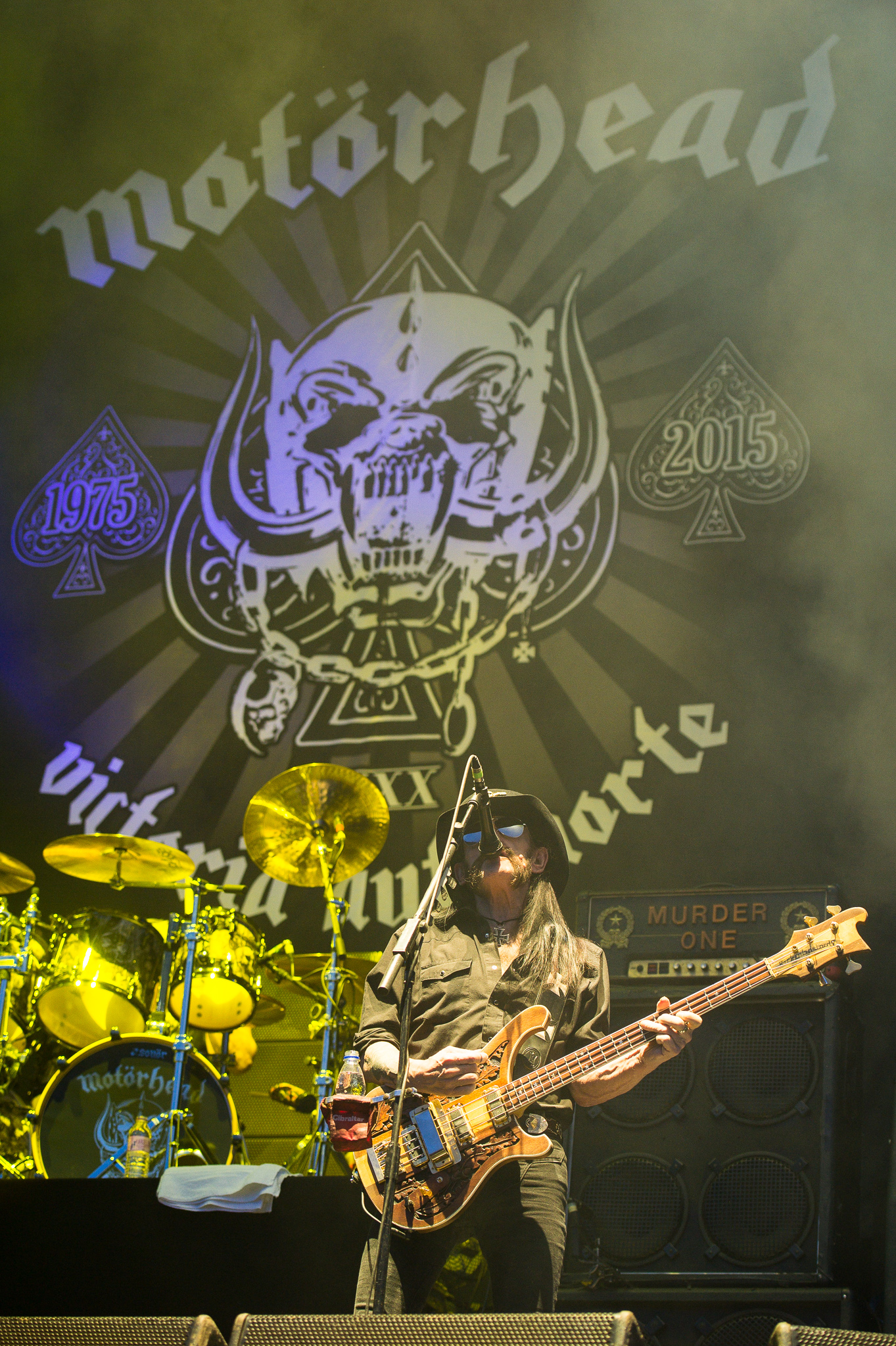 ARGO-Konzerte,Beck's Park Stage,Festival,Ian Fraser „Lemmy“ Kilmister,Konzert,Lemmy Kilmister,Livekonzert,Livemusik,Motörhead,Musik,RiP,Rock im Park 2015